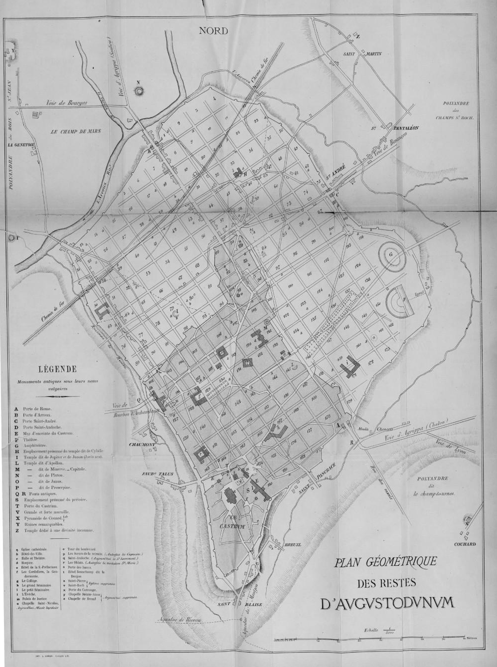 Plan de la ville d'Autun antique, dressé par Jean Roidot-Deléage d'après les relevés archéologiques qu'il y a effectués.